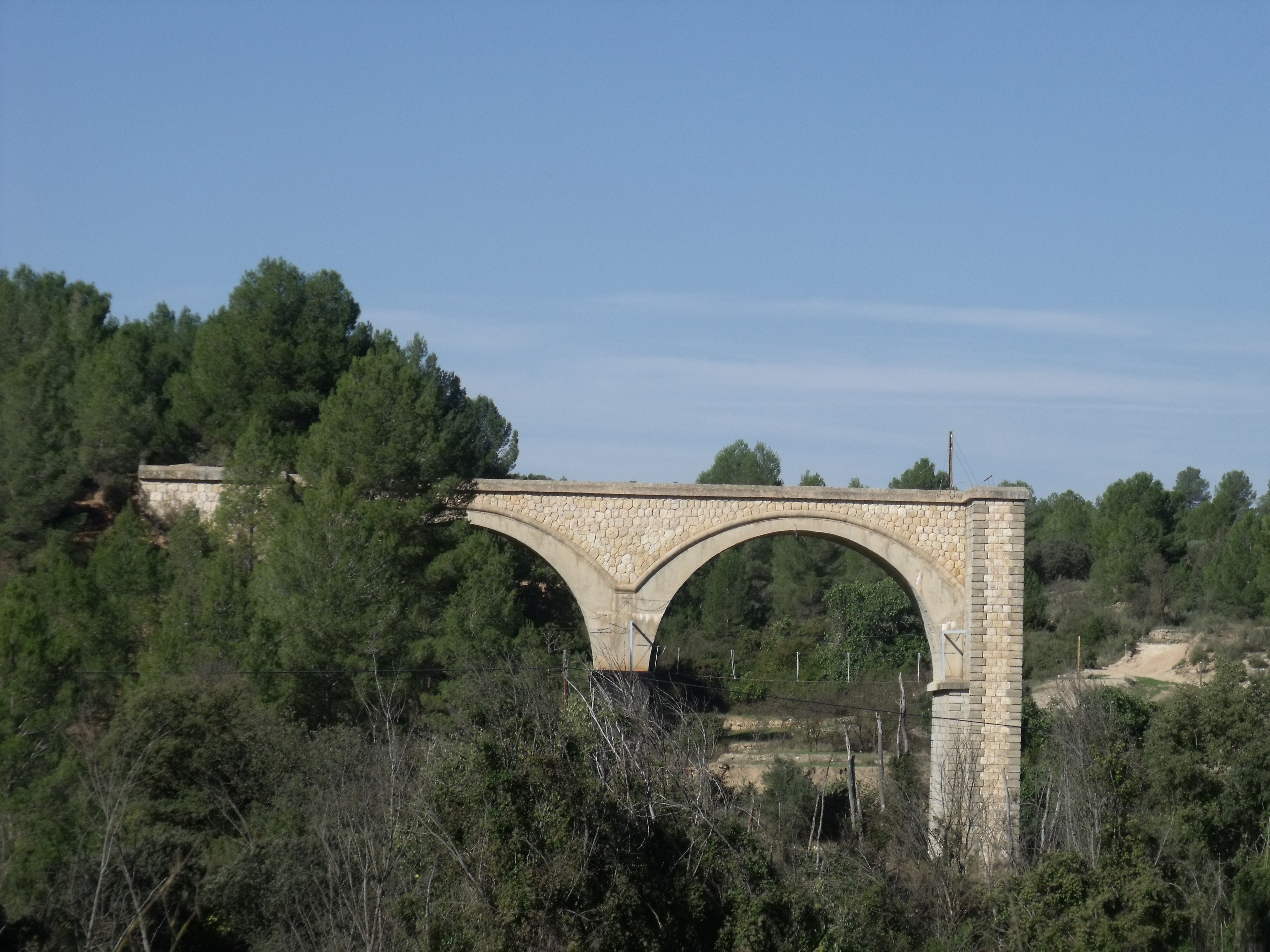 Puente sin acabar de construir de la línea de tren Baeza-Utiel